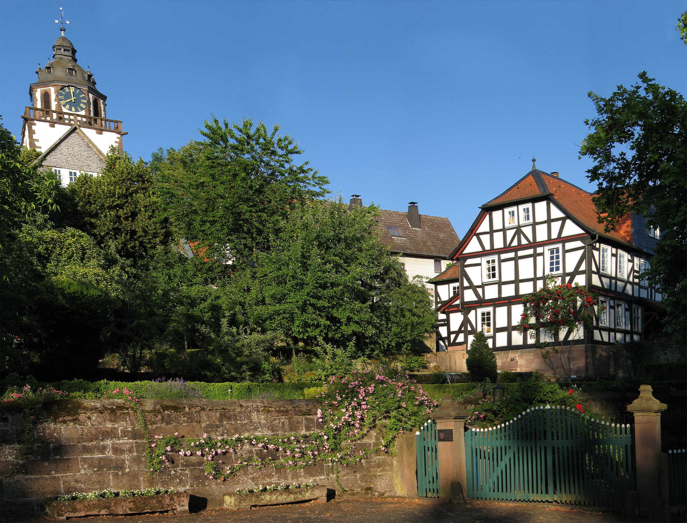 Gillhof in Kirchhain, Komturei des Deutschordens